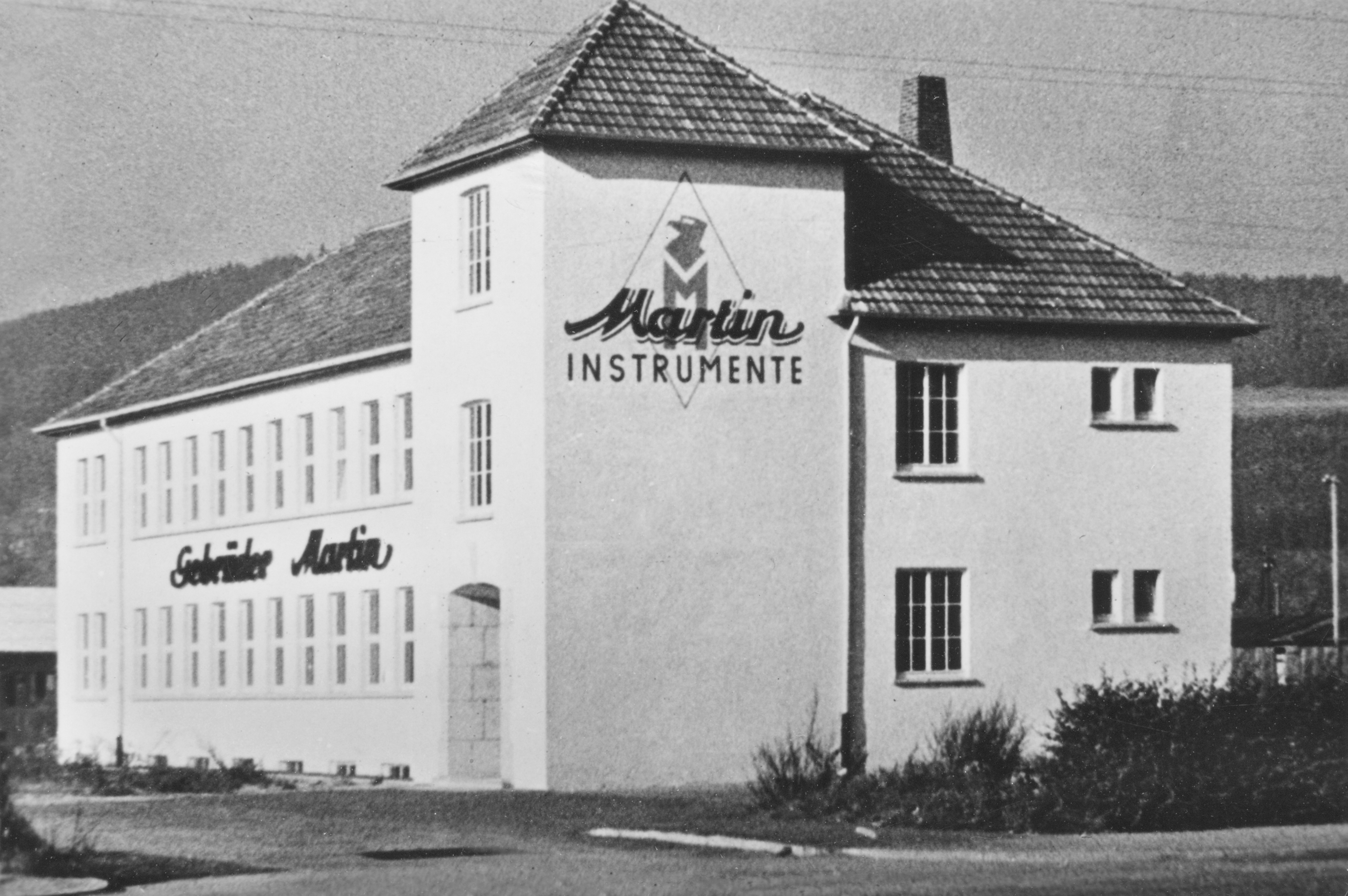 Firmensitz von Gebrüder Martin bis zum Umzug in die Ludwigstaler Str. 132 in Tuttlingen im Jahr 1980